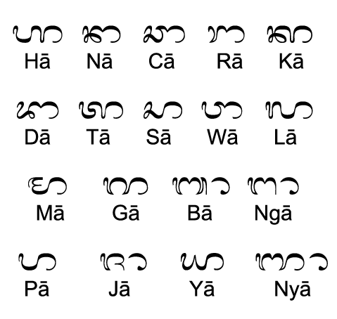 Contoh penggunaan tedung dalam aksara Bali.